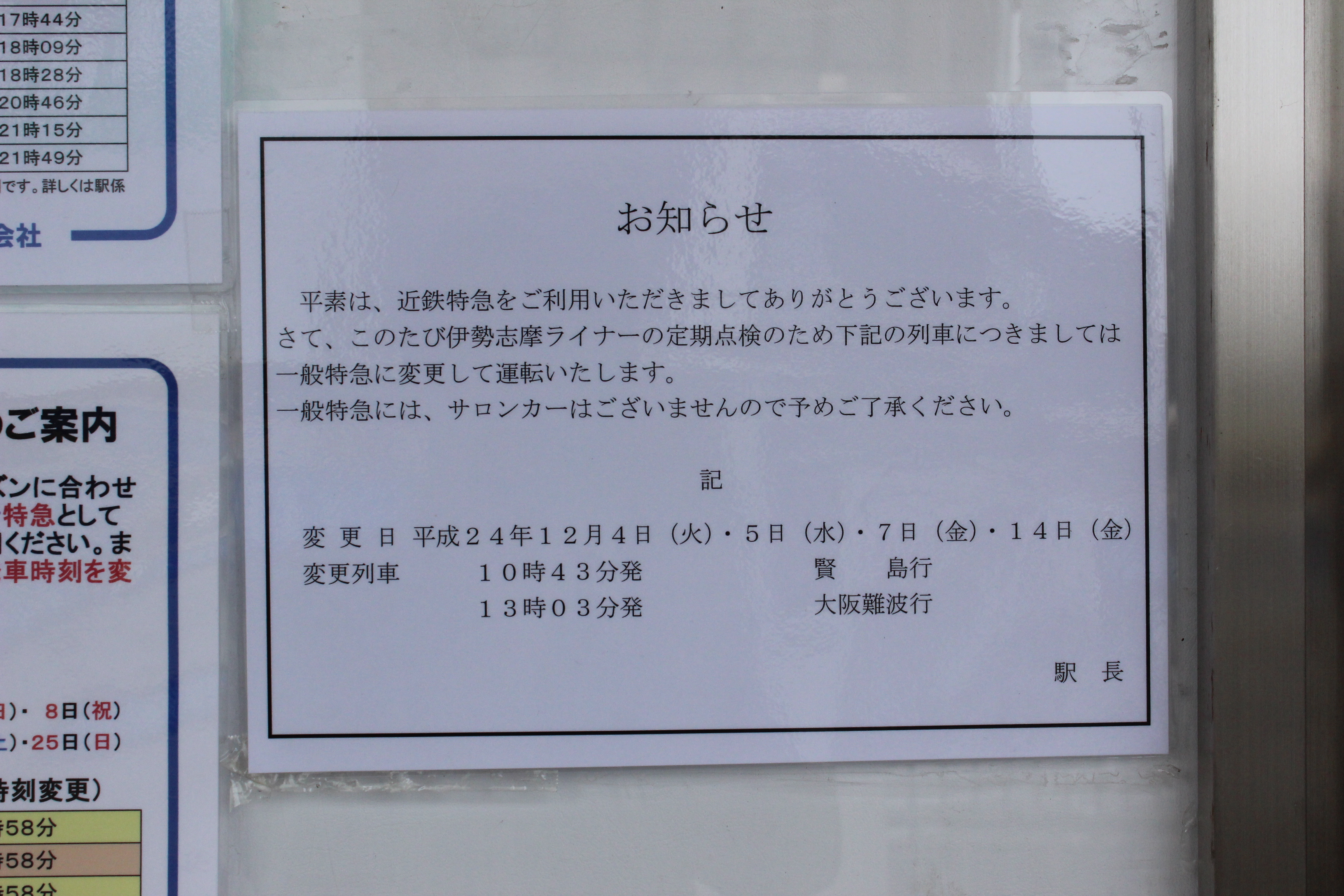 23000系で運用される列車が定期点検のために一般特急車に変更されることを知らせる表示